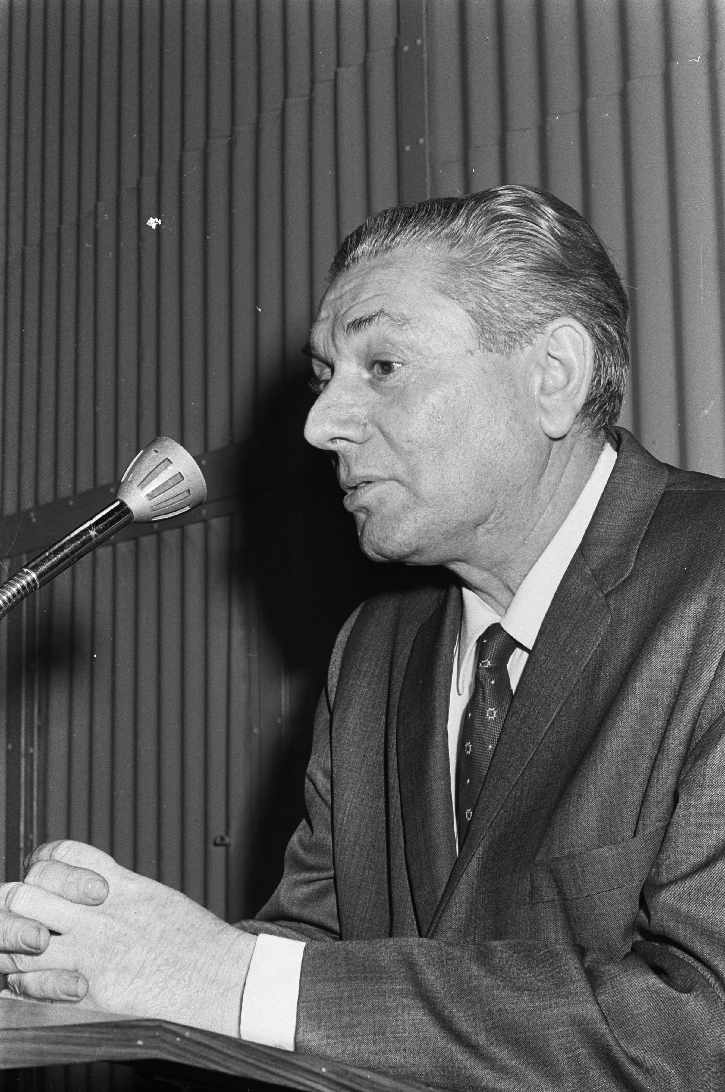 Collectie / Archief : Fotocollectie Anefo Reportage / Serie : Teach-in van de PSP over de situatie in het Midden-Oosten in Grand Hotel Krasnapolsky Beschrijving : Aan het woord is de heer Sim cha Flapon, vertegenwoordiger van de MAPAM (MAPAM: Mifleget HaPoalim HaMeuhedet , letterlijk: Verenigde Arbeiderspartij; Israël) Datum : 15 juni 1967 Locatie : Amsterdam, Noord-Holland Trefwoorden : afgevaardigden, bijeenkomsten, hotels, politieke partijen Persoonsnaam : Flapon, S. cha Fotograaf : Fotograaf Onbekend / Anefo Auteursrechthebbende : Nationaal Archief Materiaalsoort : Negatief (zwart/wit) Nummer archiefinventaris : bekijk toegang 2.24.01.05 Bestanddeelnummer : 920-4122